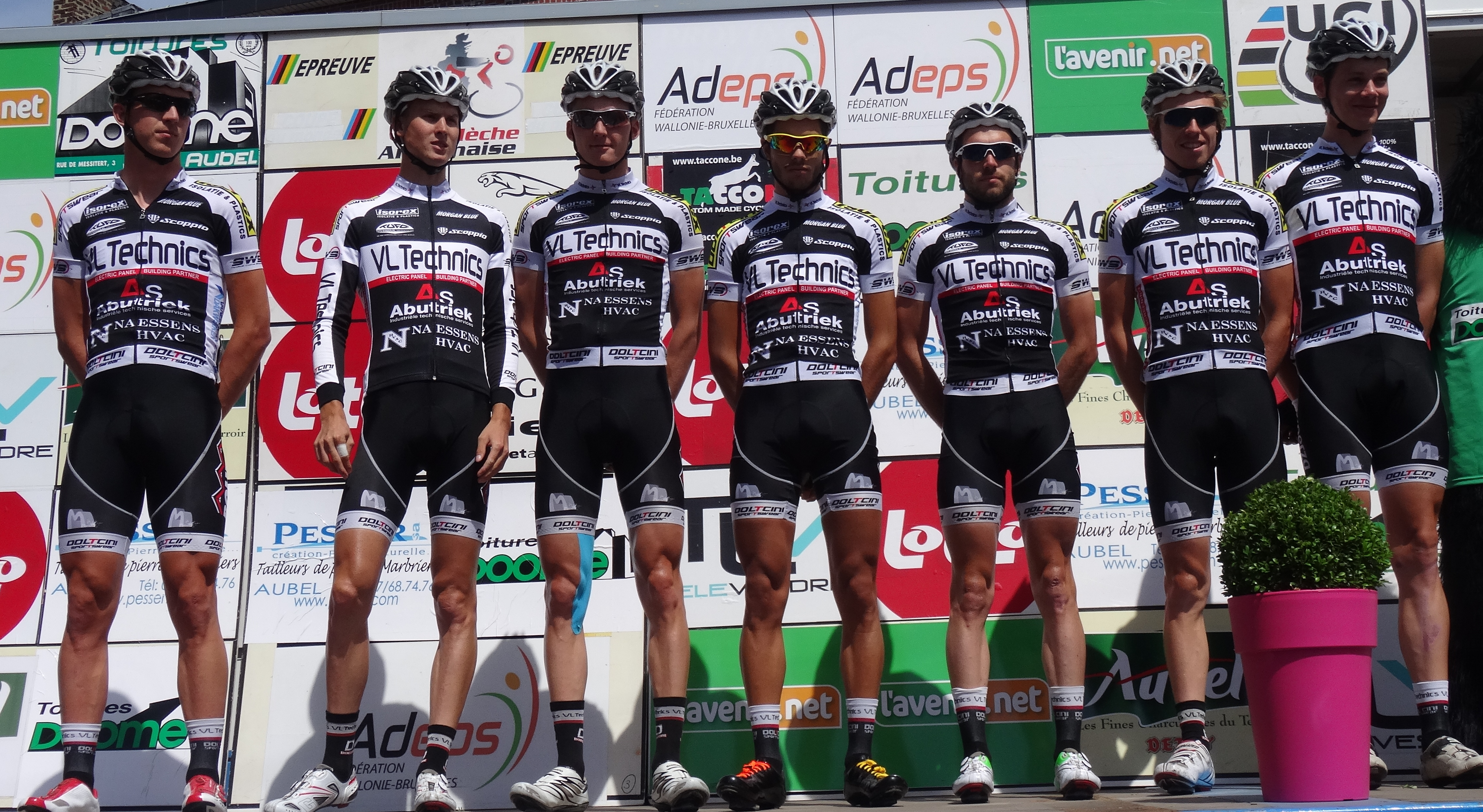 Reportage photographique réalisé le dimanche 22 juin à l'occasion du départ et de l'arrivée de la Flèche ardennaise 2014 à Herve, Belgique.